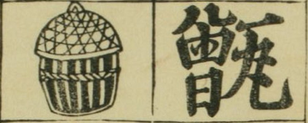 粵語: 甑。取自對大明時相四言雜字。出版洪武辛亥孟秋吉日。金陵王氏勤有書堂。